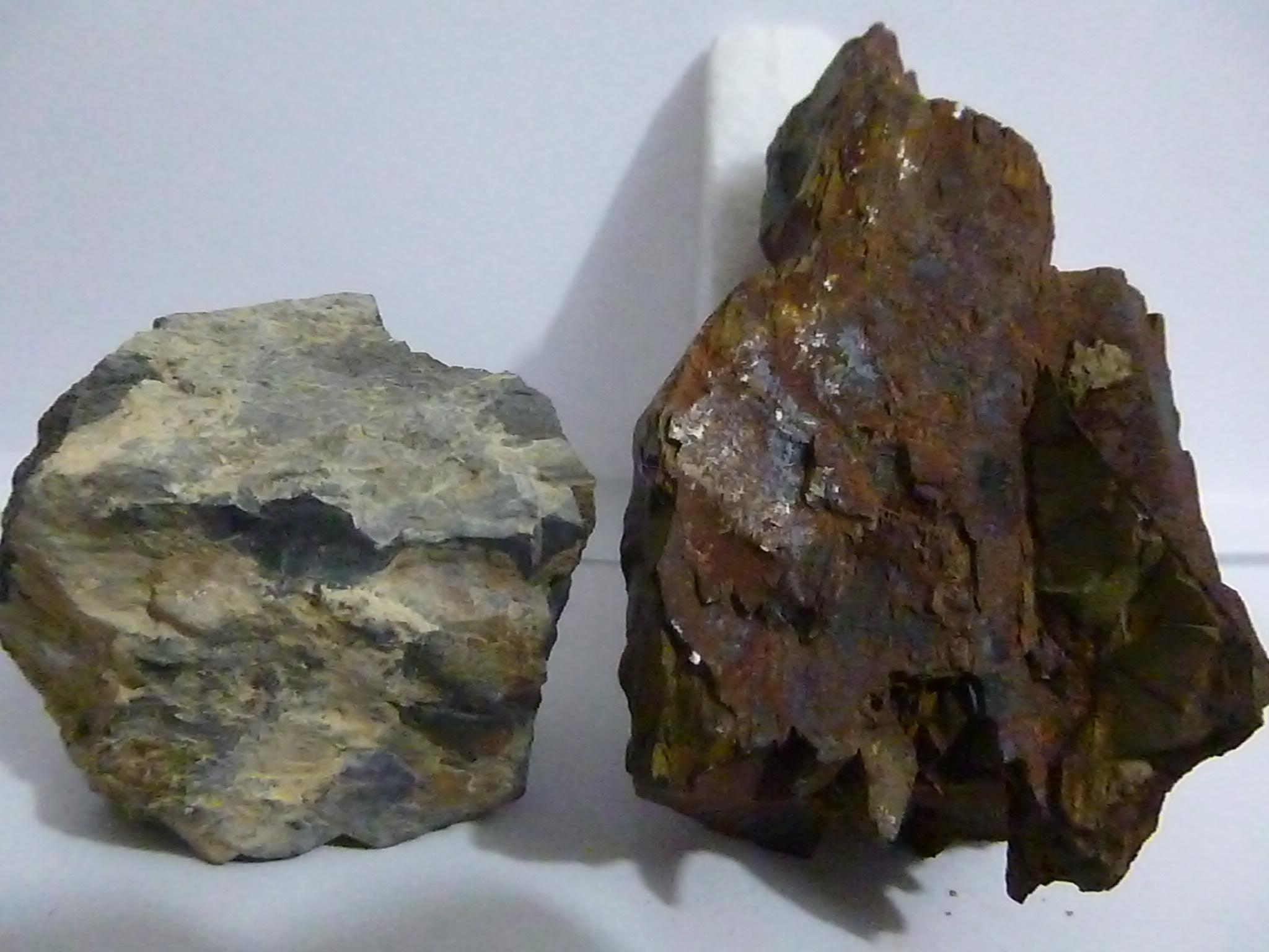 Lutitas Negra y Roja, procedentes de Chapi y Yura respectivamente. Arequipa, Perú